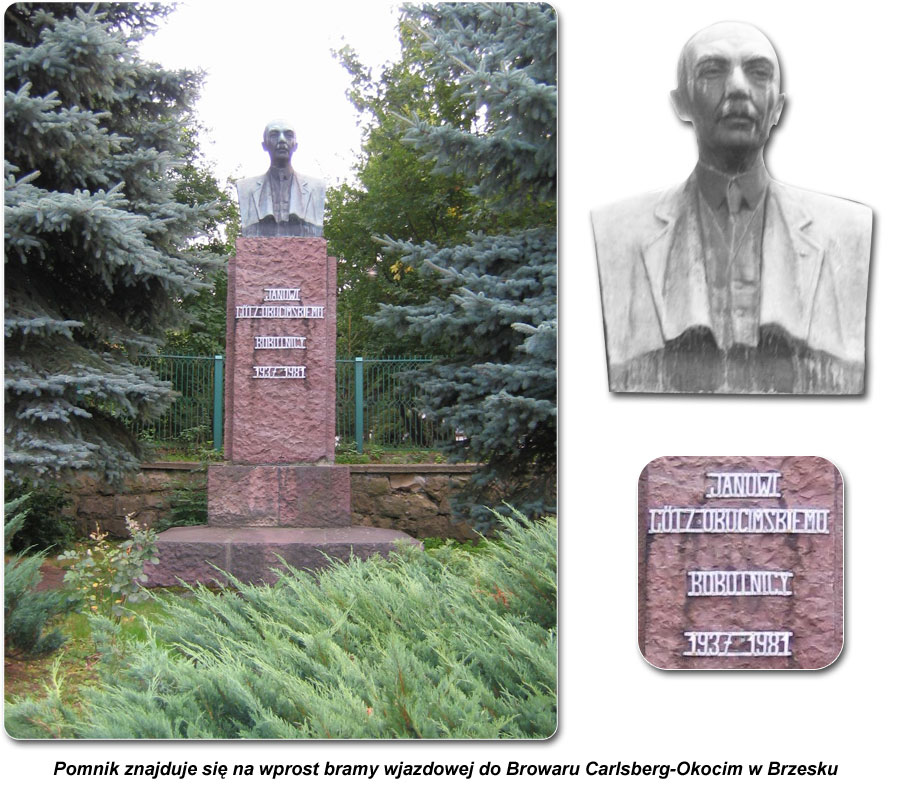 Pomnik Jana Goetz-Okocimskiego, założyciela Browaru Okocim w Brzesku, filantropa i businessman'a. Pomnik znajduje się na wprost bramy wjazdowej do browaru Carlsberg-Okocim w Brzesku.